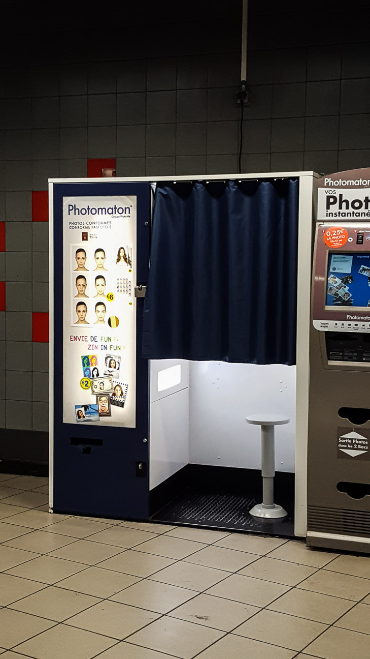 photographie d'une cabine photographique prise dans le couloir d'une station métro à Bruxelles.